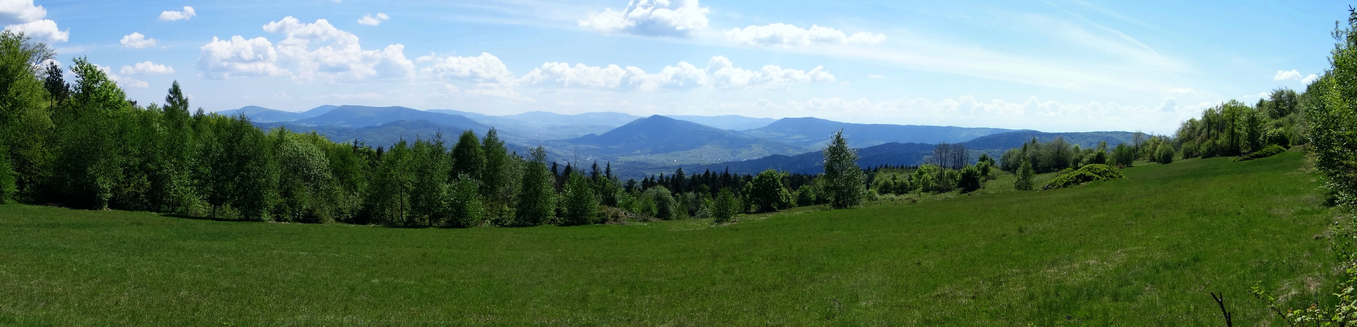 Polana Pękalówka w Beskidzie Makowskim i panorama widokowa